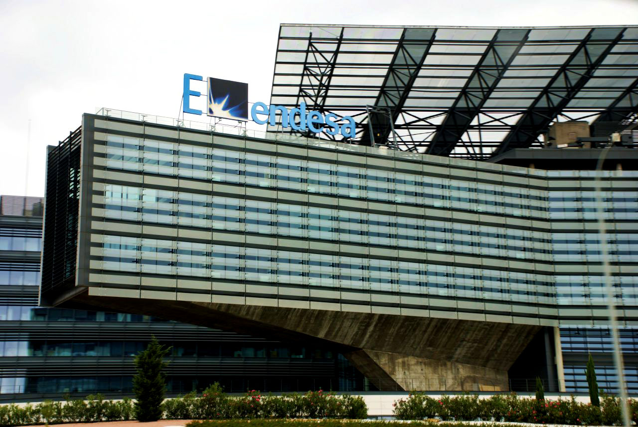 Sede de Endesa, Madrid. Espectacular... casi tanto como la nueva sede de TELEFONICA